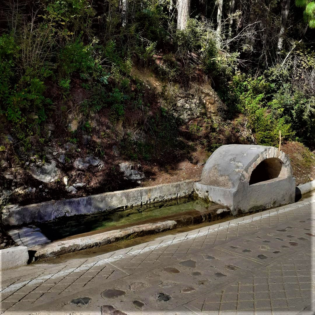 Caja de Agua "El chorrito" en San Juan Achiutla"